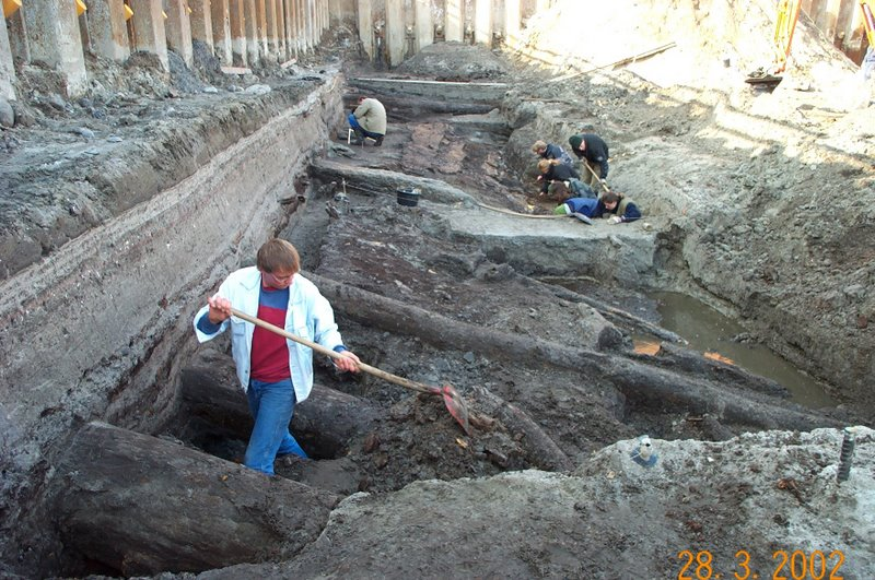 Einbäume von Stralsund, Fundstelle Einbaum 2 und 3 (2002-03-20) b